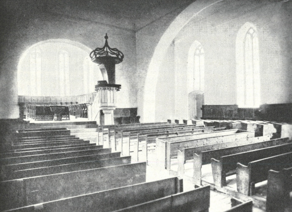 ref. Kirche Küsnacht 1886